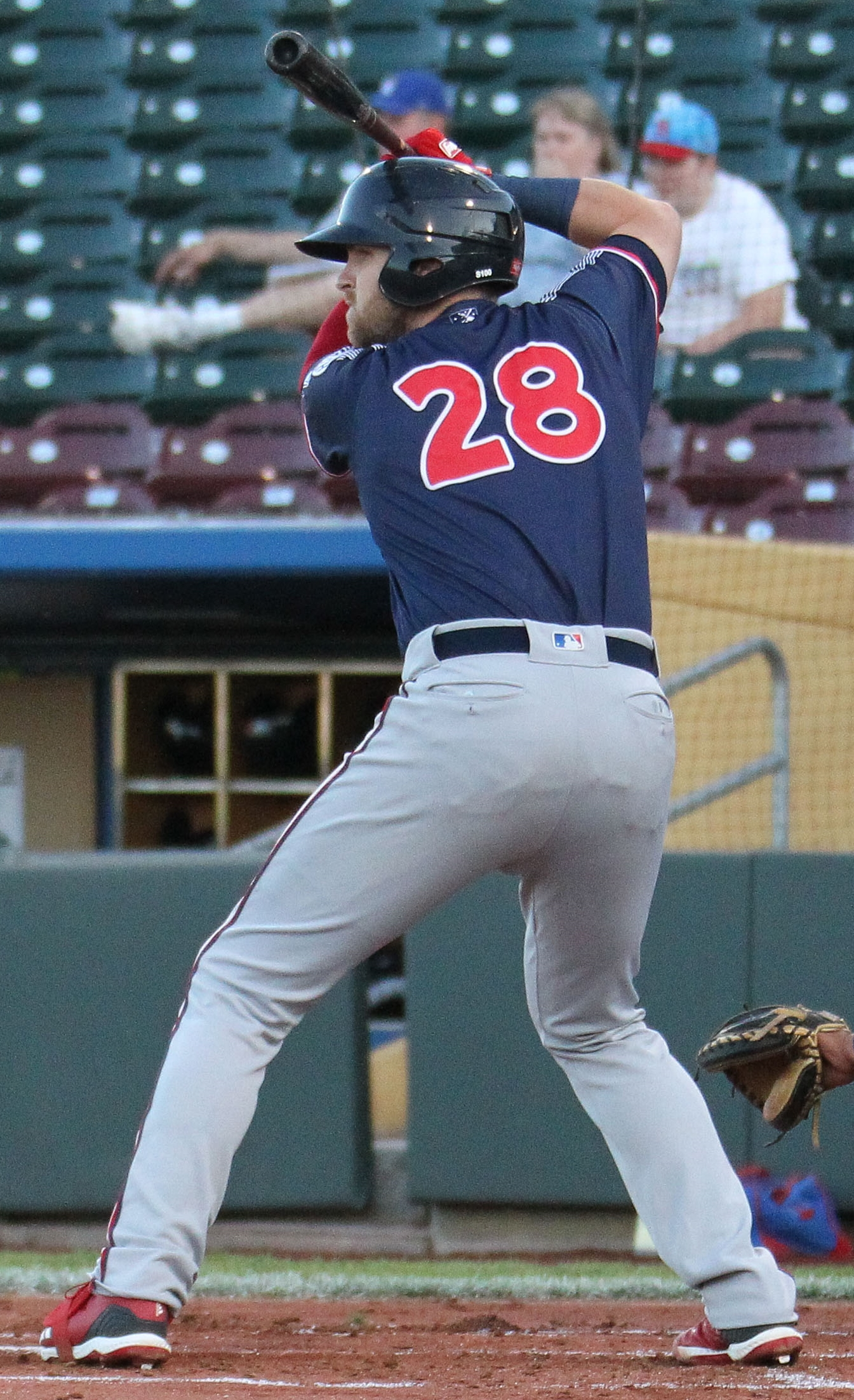 Jett Bandy at bat